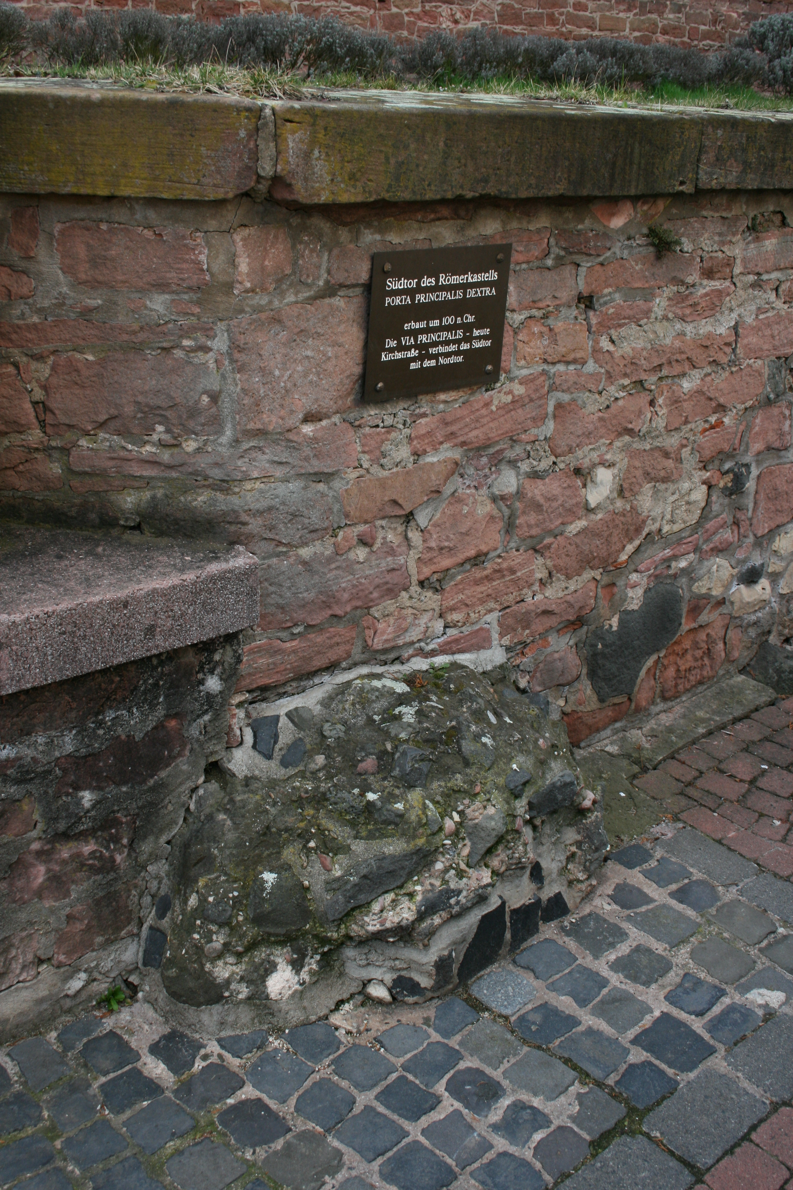 Mauerstück des Kastells Großkrotzenburg an der Kirchhofmauer.